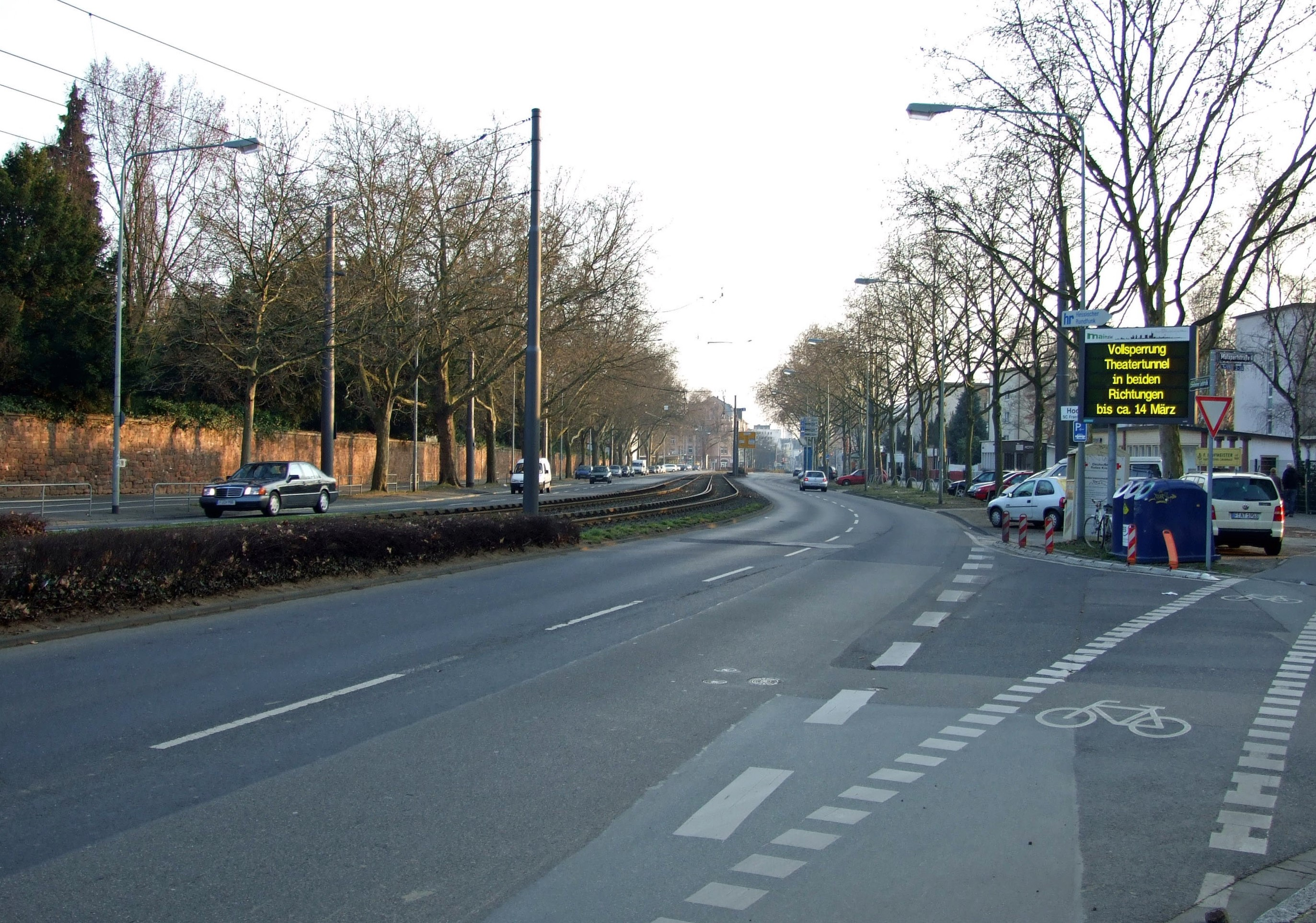 westliche Grenz-Mauer des Frankfurter Hauptfriedhofes an der Eckenheimer Landstrasse